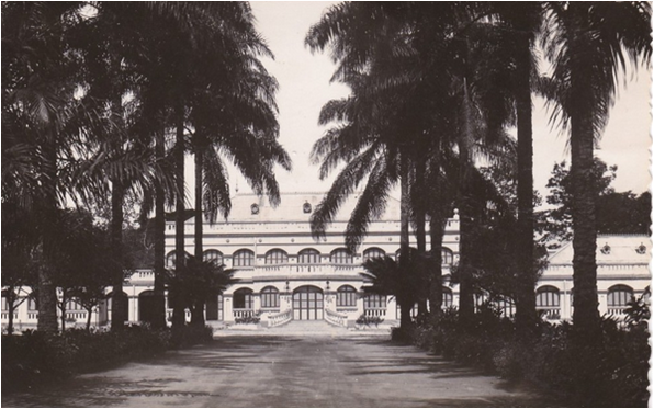 Palais du gouverneur de Brazzaville, devenu Palais du peuple depuis 1995.